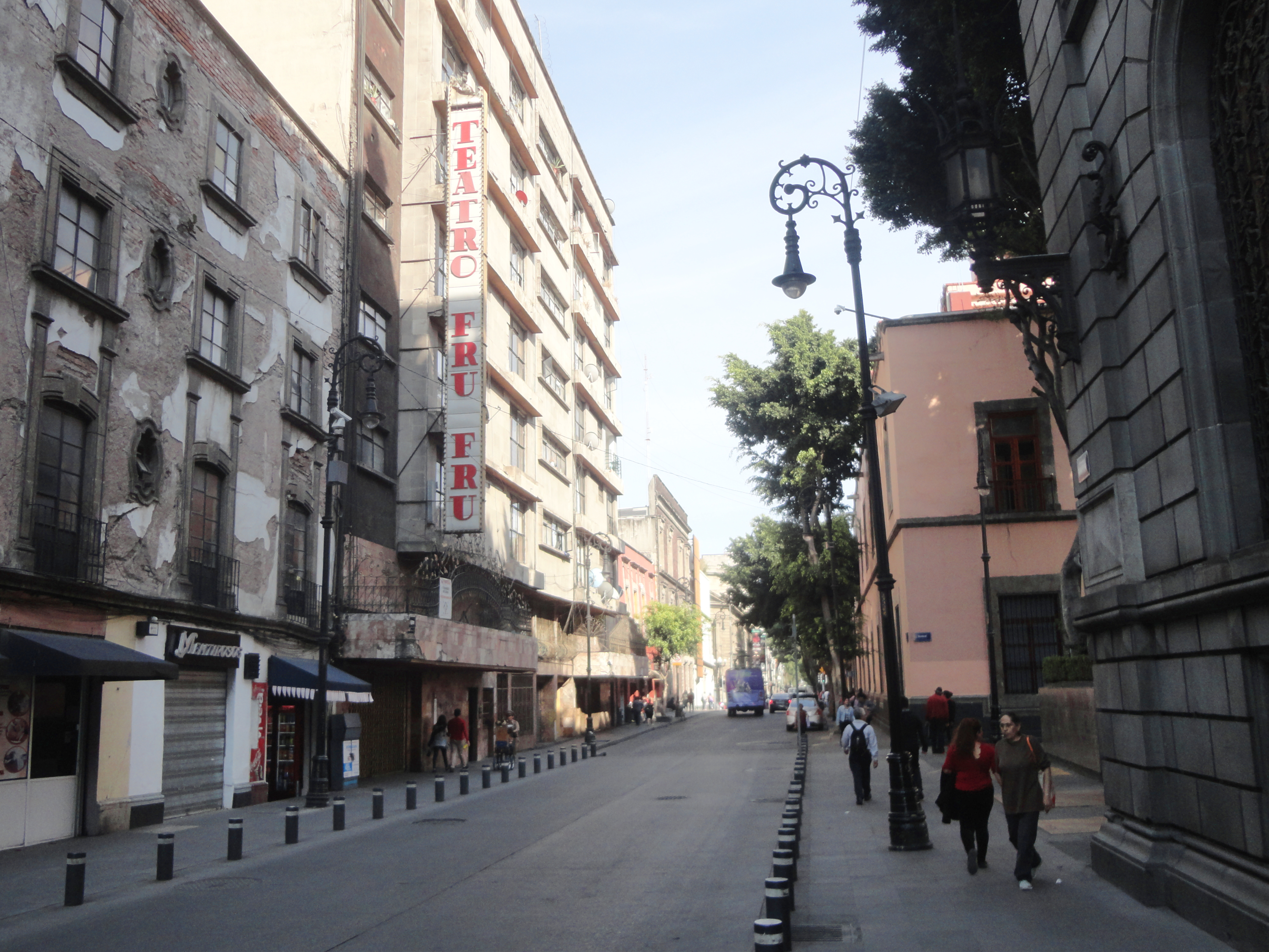 Teatro Fru Fru en Calle de Donceles, Ciudad de México.